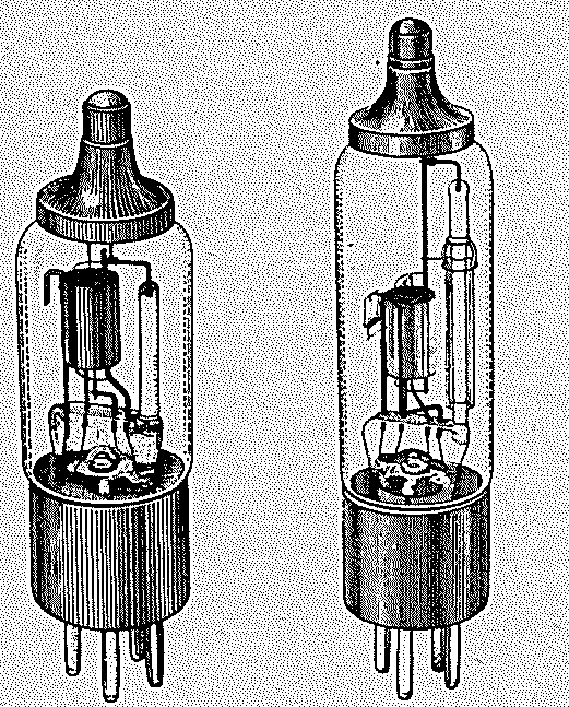 Zeichnerische Darstellung der Elektrometerröhren T113 und T114